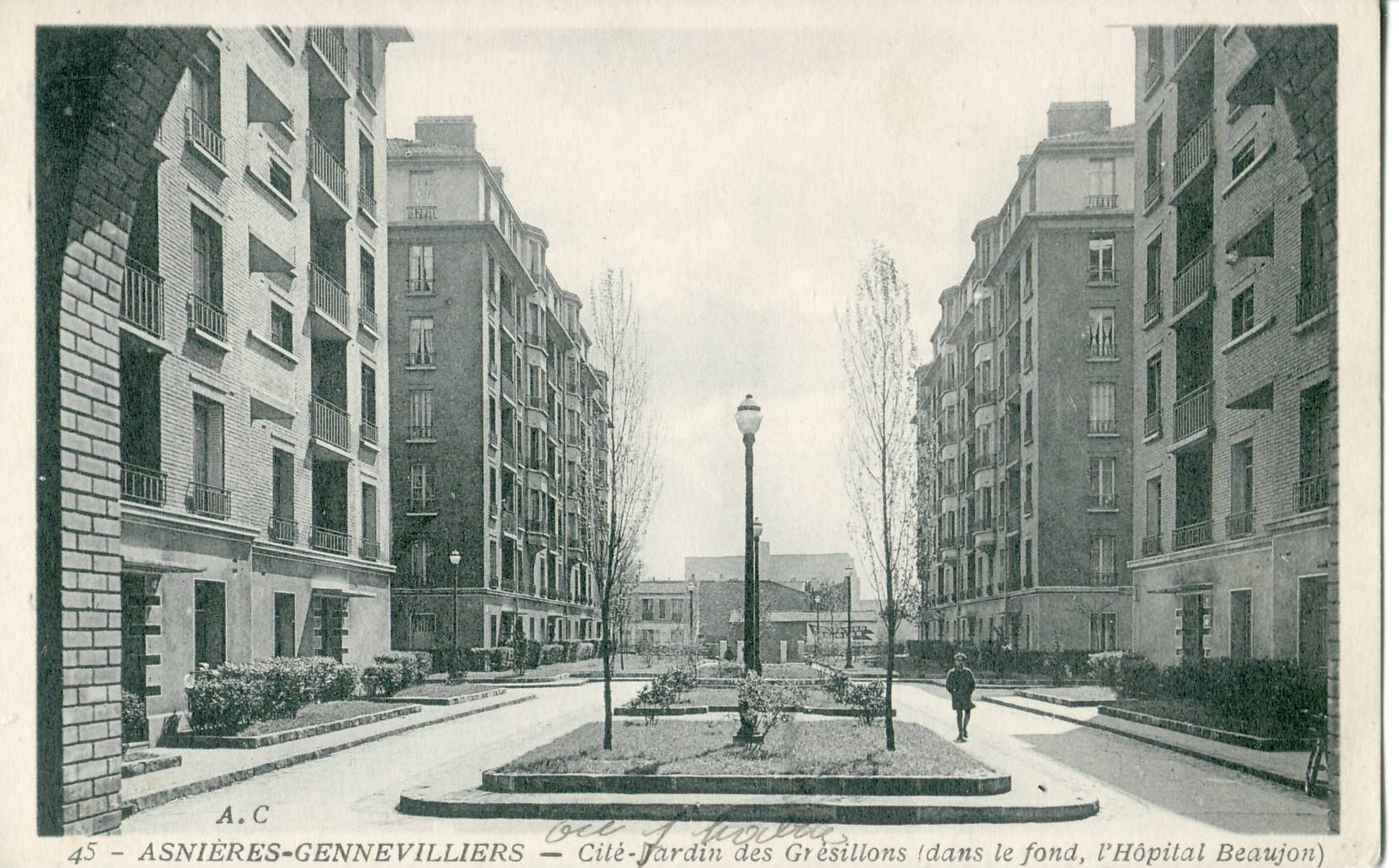 Carte postale ancienne éditée par AC, N°45 ASNIERES - GENNEVILLIERS : Cité-jardin des Grésillons (dans le fonds, l'hôpital Beaujon)